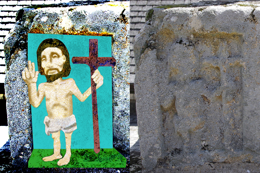 Colorisation d'un élément de la base du calvaire du Scouhel visible près de l'église paroissiale de Caudan. Cette œuvre représente le Christ ressucité bénissant.